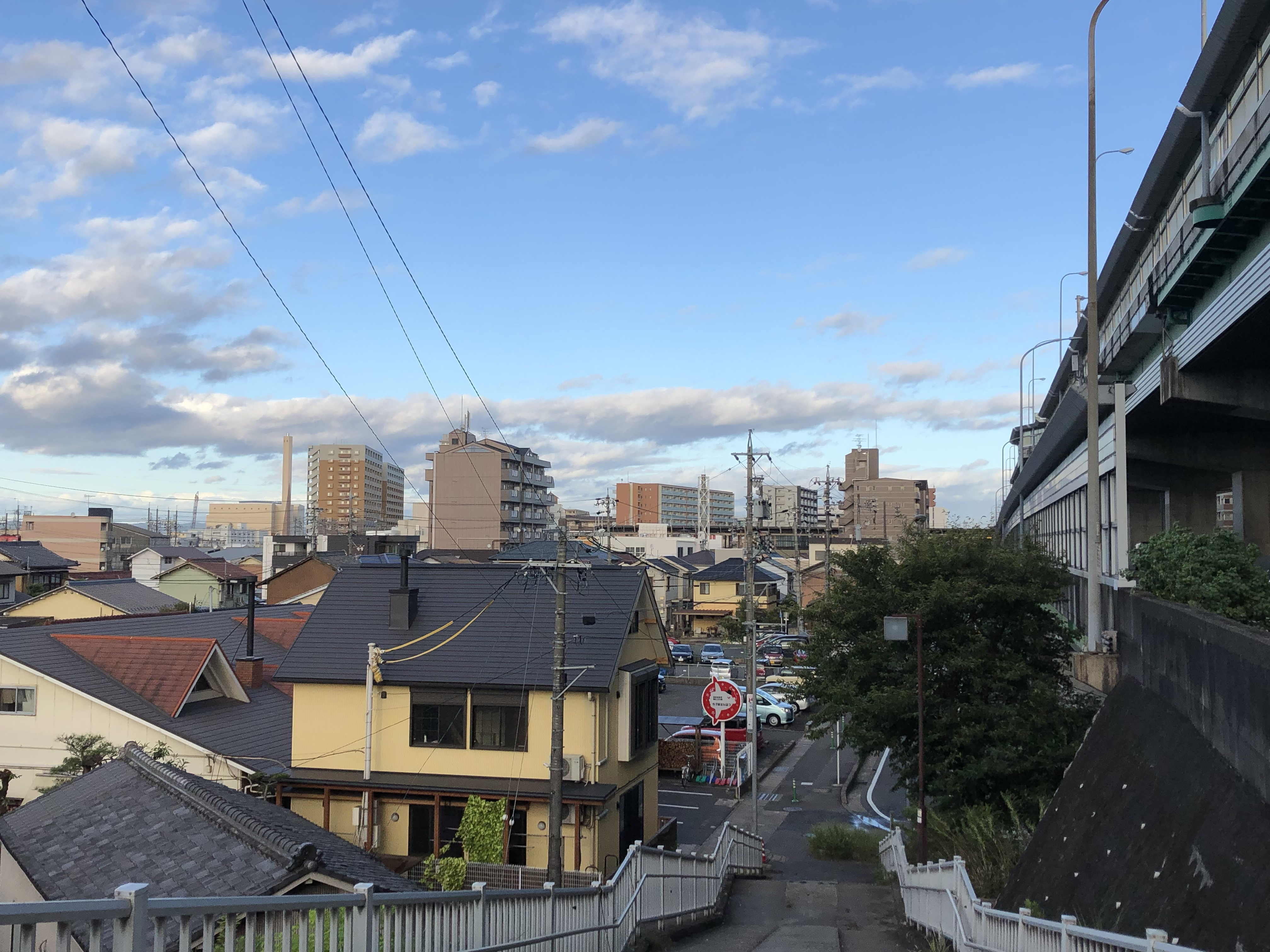 新平田橋から上小田井駅周辺方面を臨む。